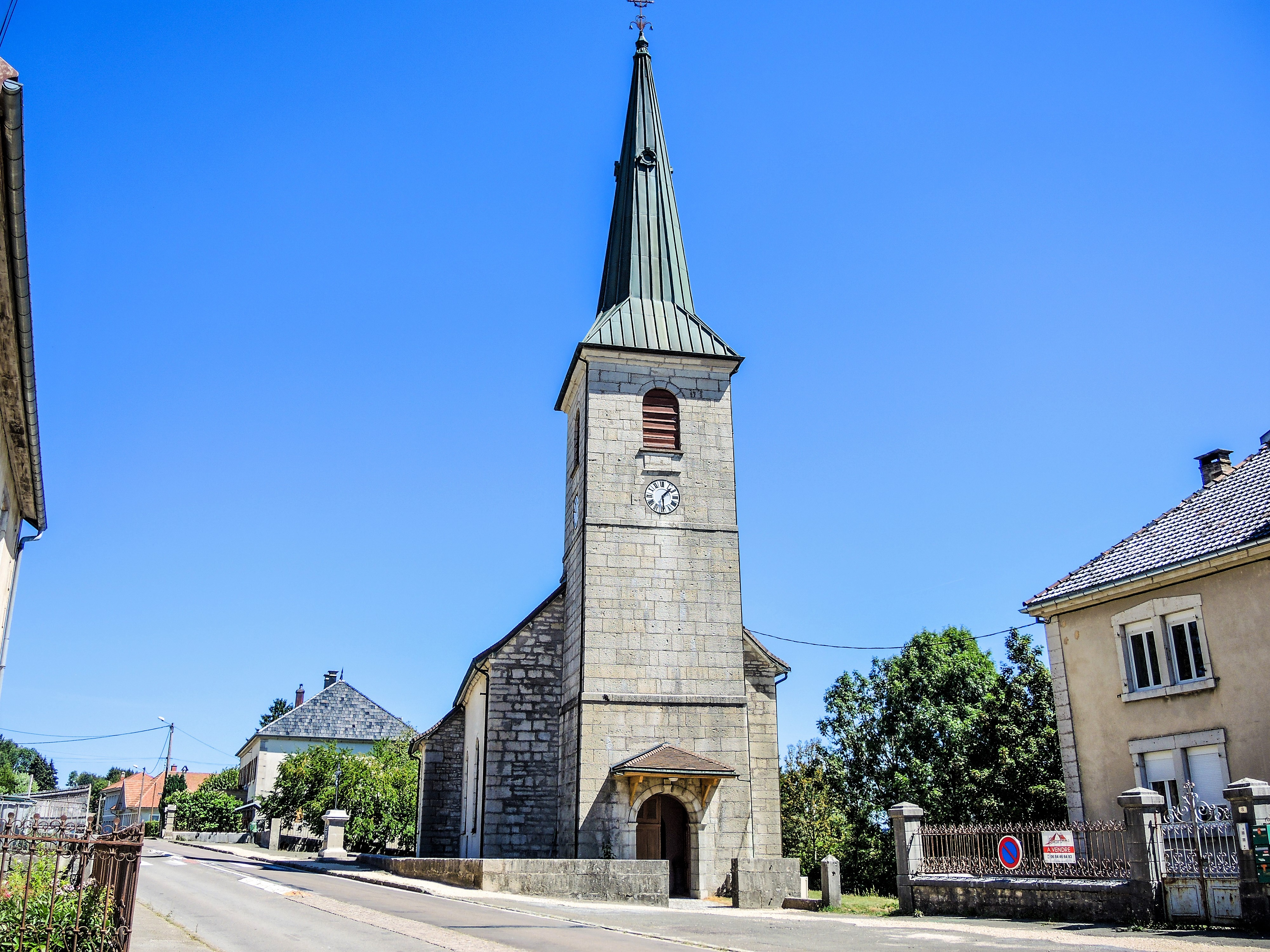 Clocher et porche de l'église Sainte-Anne des Fontenelles. Doubs